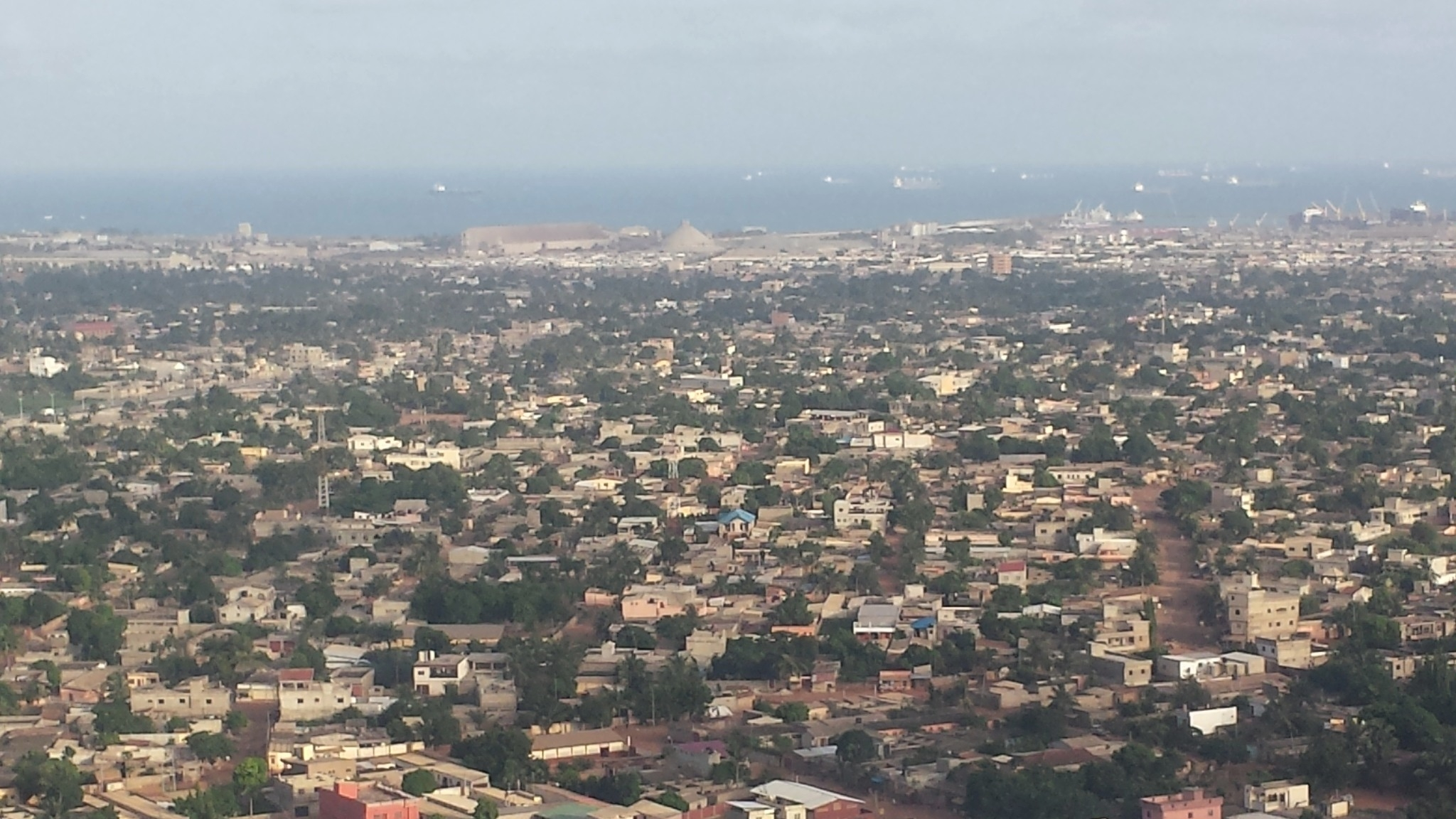 Togo, approach into Lomé